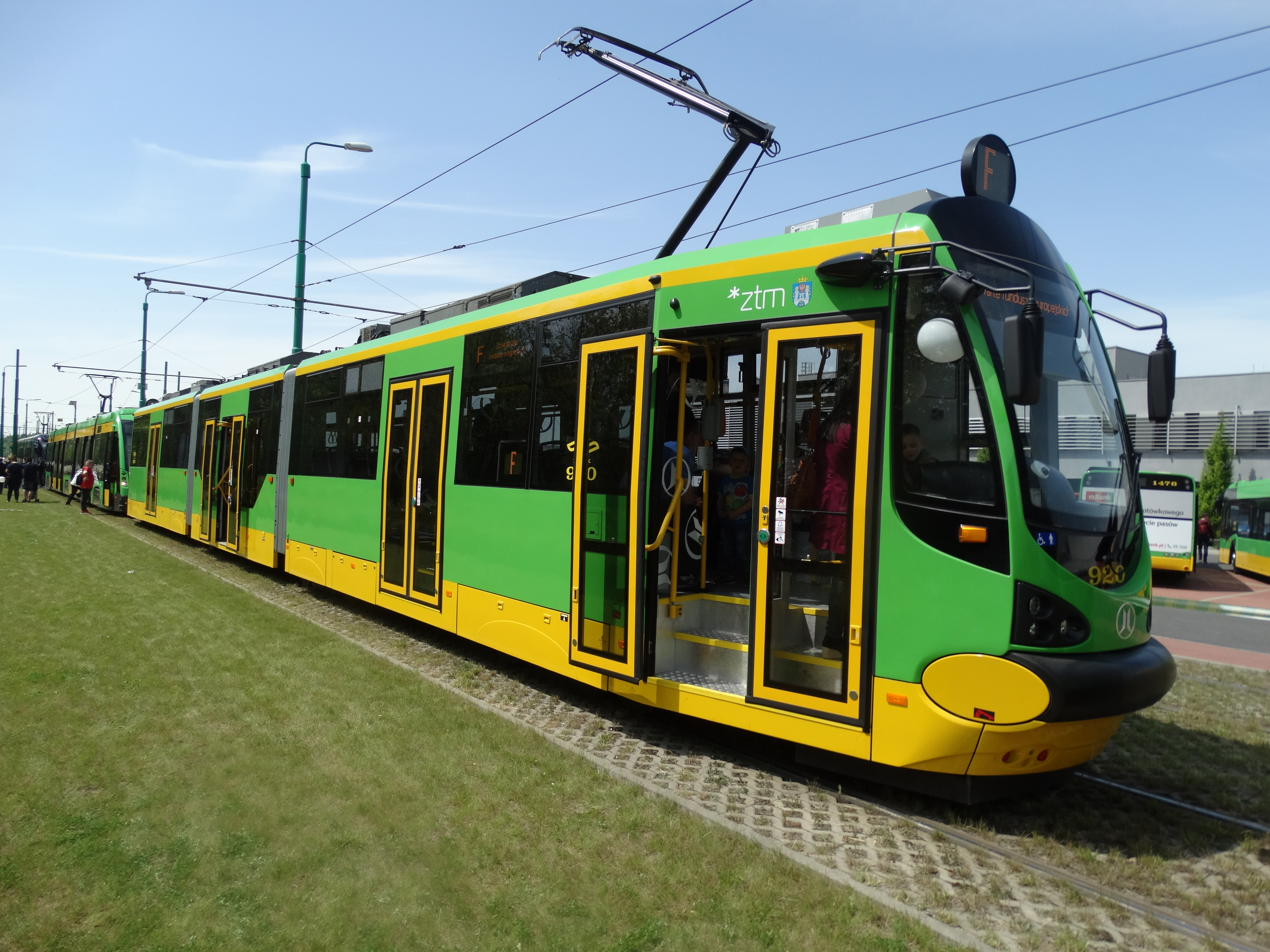 Moderus Beta MF 22 AC BD 920 na terenie zajezdni na Franowie.